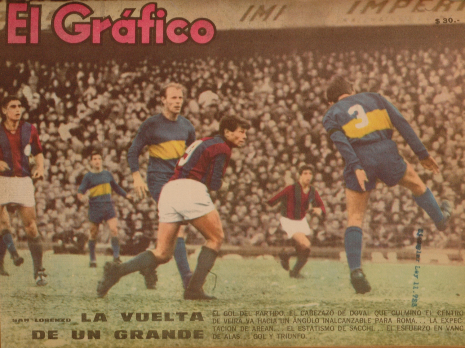 El Grafico del 13 de Julio de 1965. Edicion 2388